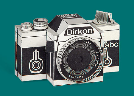 Dirkon cameras